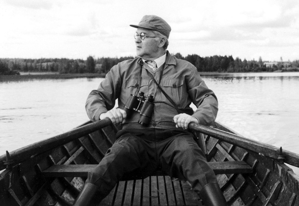 luonnonsuojelija